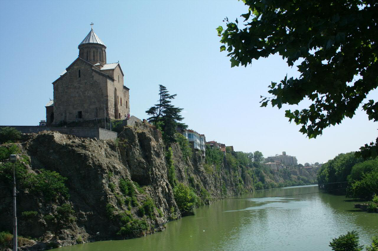 Eglise Meteki et riviere Mtkvari